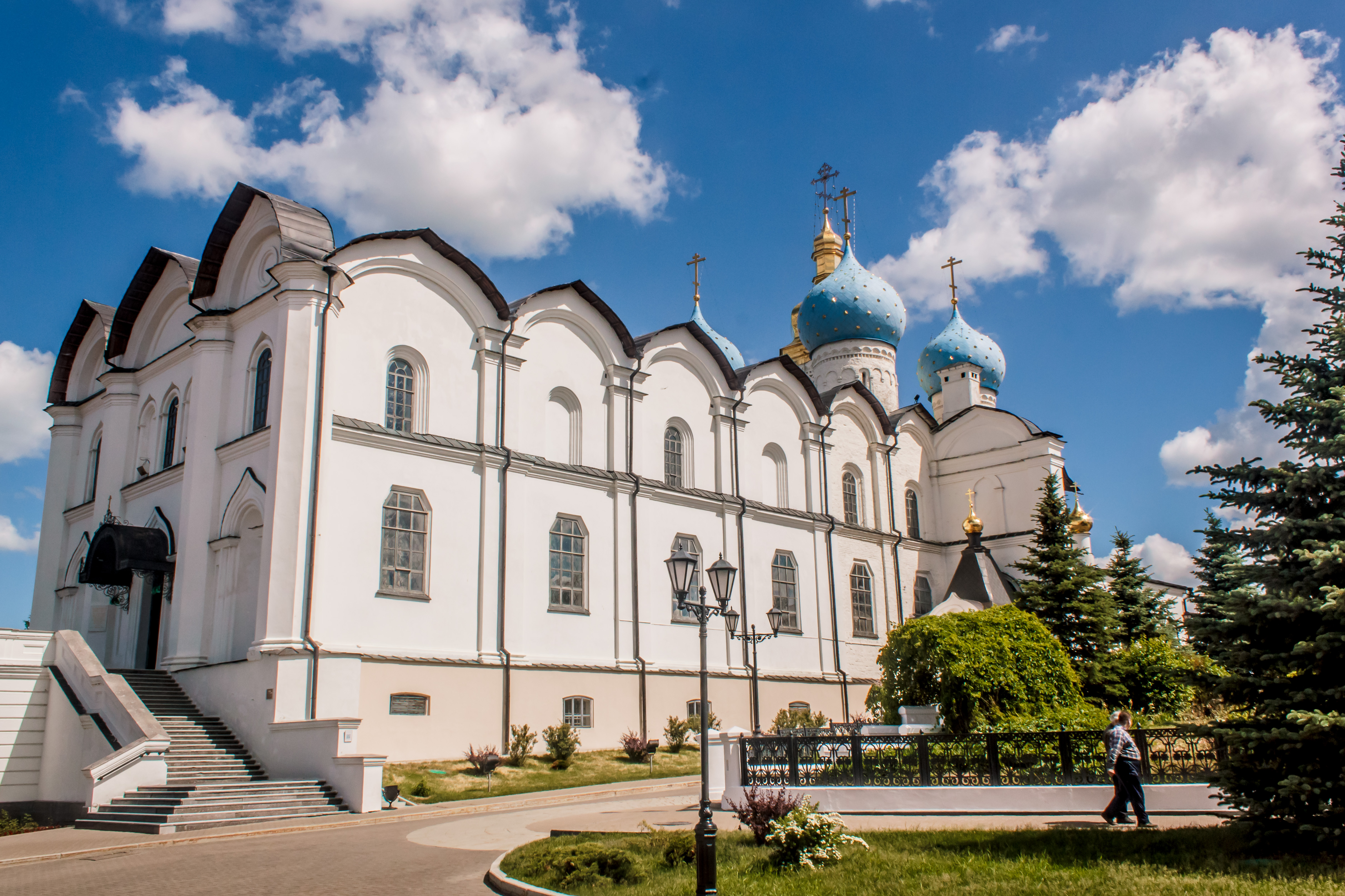 Собор Благовещенский кафедральный: Кремль, Казань, Татарстан